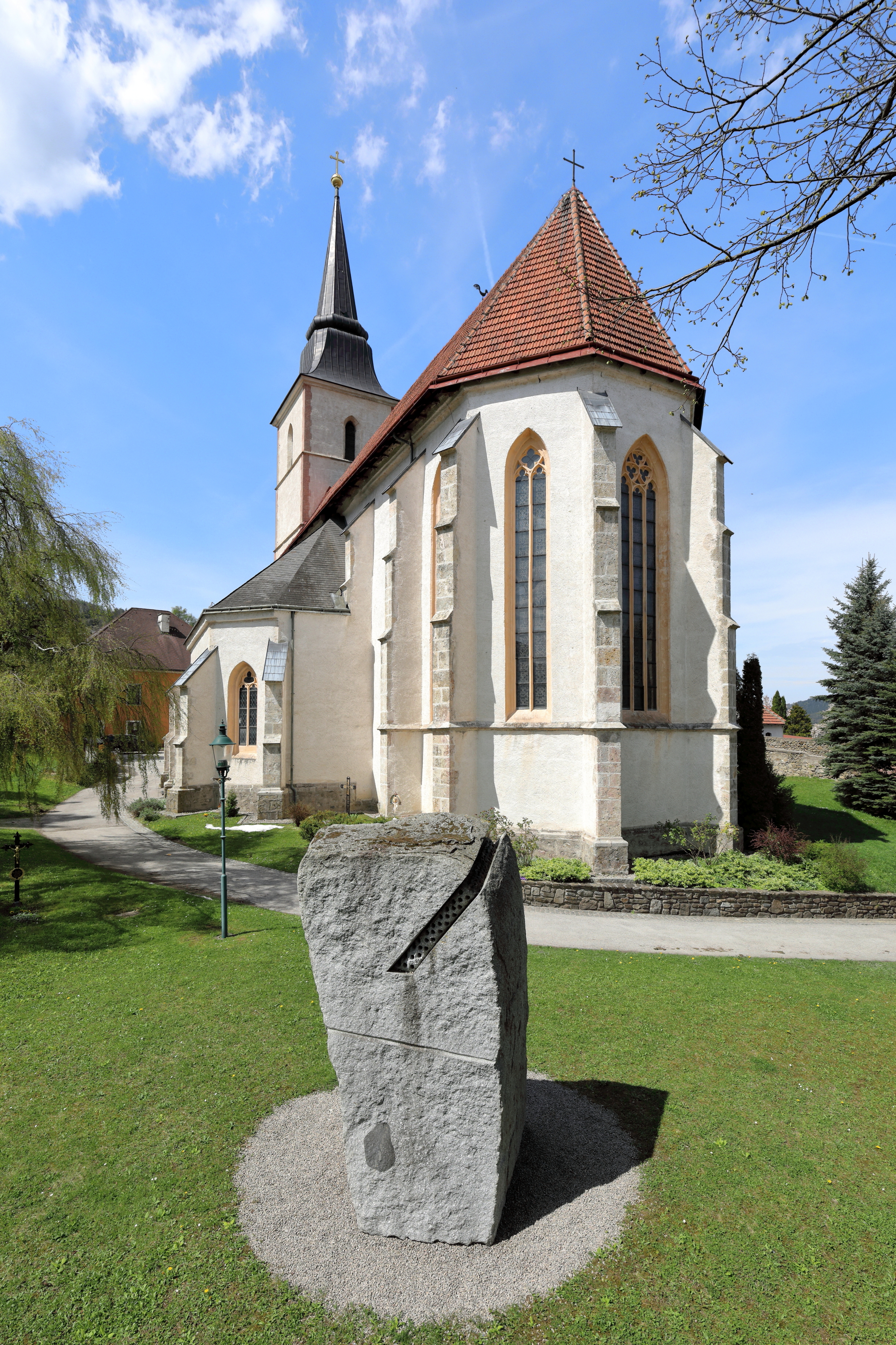 Die röm.-kath. Pfarrkirche hl. Andreas in der niederösterreichischen Stadt Hainfeld.Die zweischiffige (spät)gotische Kirche wurde vermutlich über einem älteren Vorgängerbau errichtet und hat eine südliche Seitenkapelle sowie einen wuchtigen Westturm. Vor der Kirche ein bearbeiteter Steinblock von dem Bildhauer Gottfried Höllwarth (Andreaskreuz/Andreas-Stein, aufgestellt am 11. Sep. 2009).